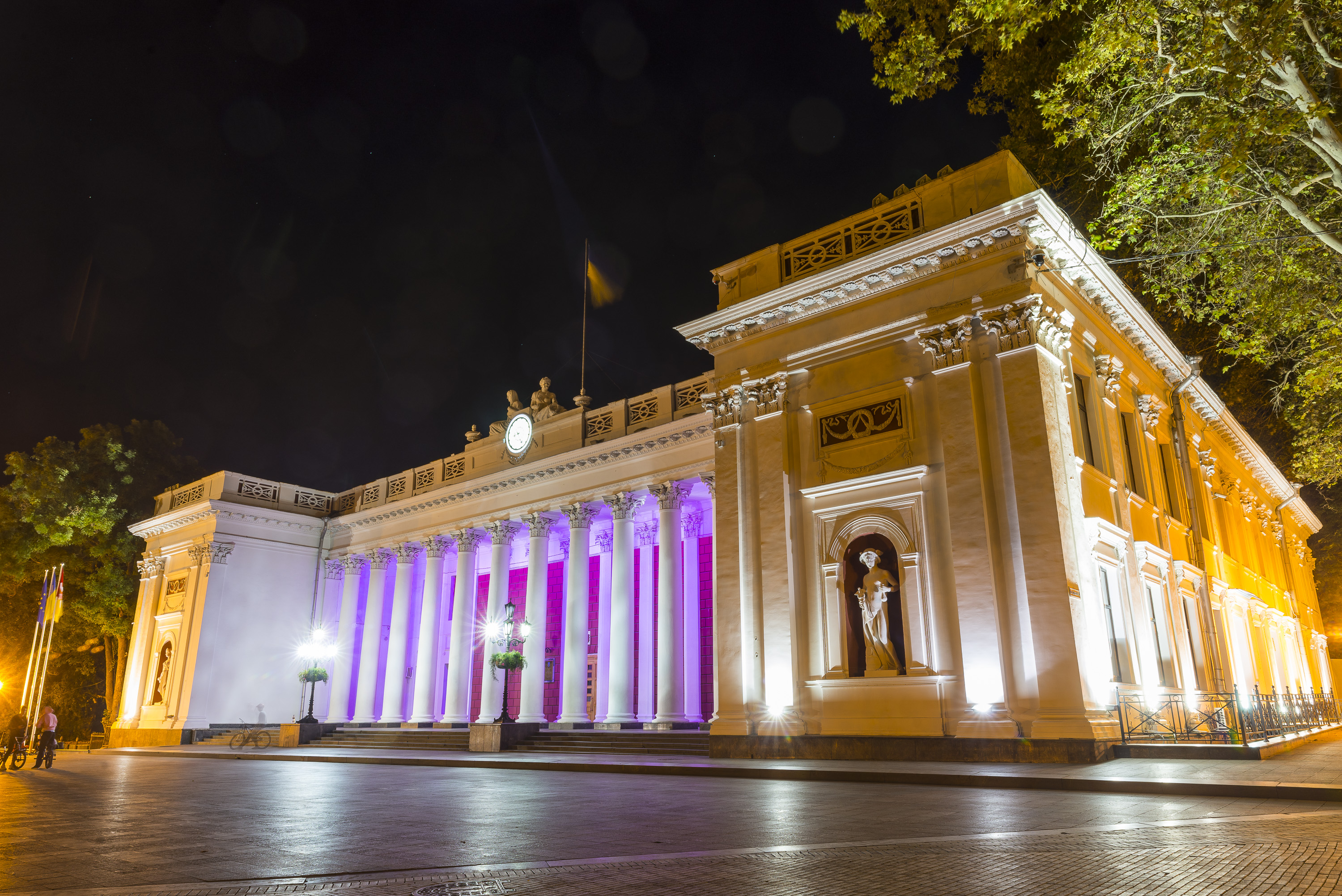 Будівля старої біржі, де 14 (27) січня 1918 року відбулися загальні збори робітничих, селянських, матроських і солдатських депутатів, на яких було проголошено радянську владу у м. Одесі, Одеса, пл. Думська, 1